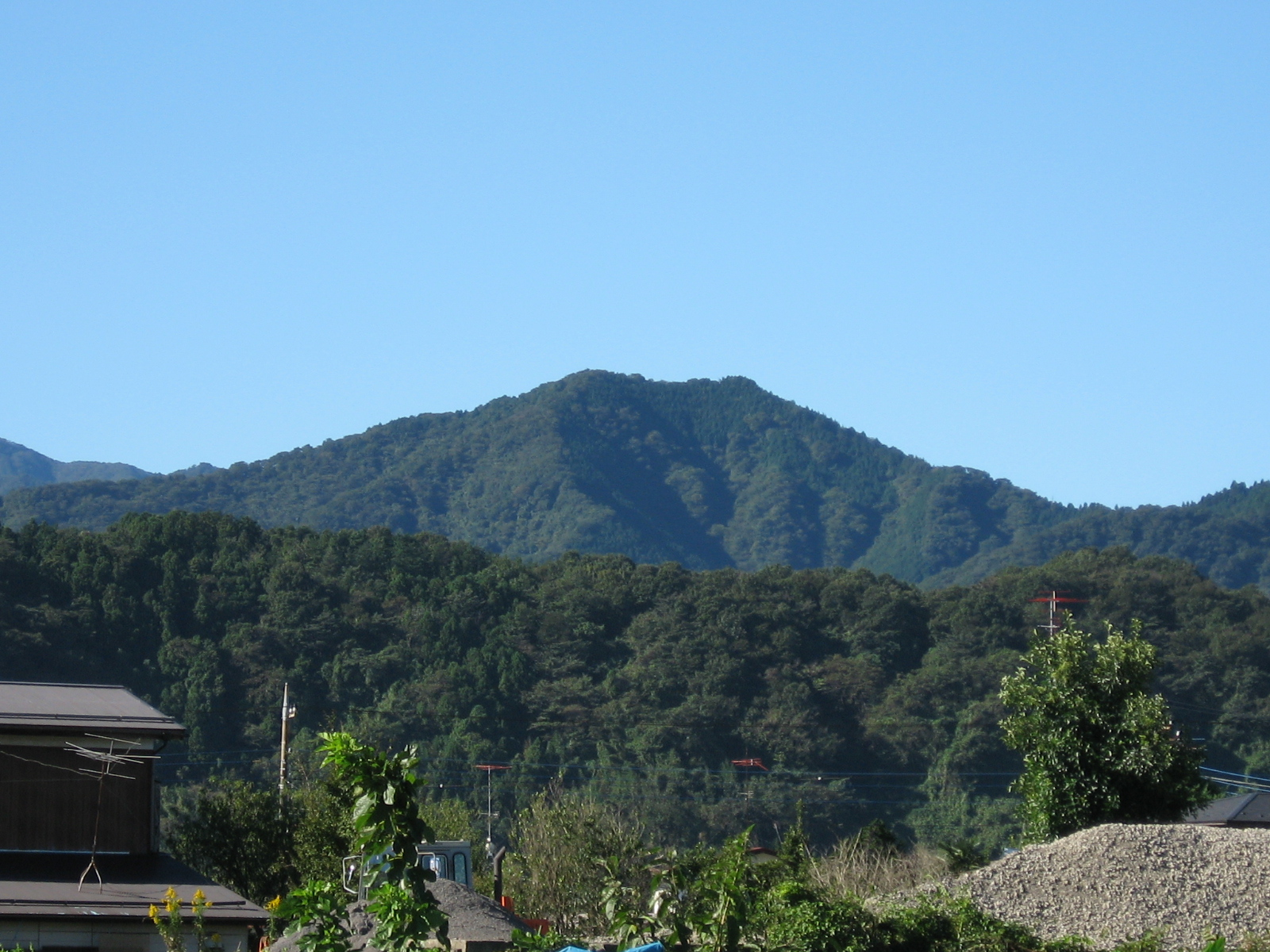 華厳山